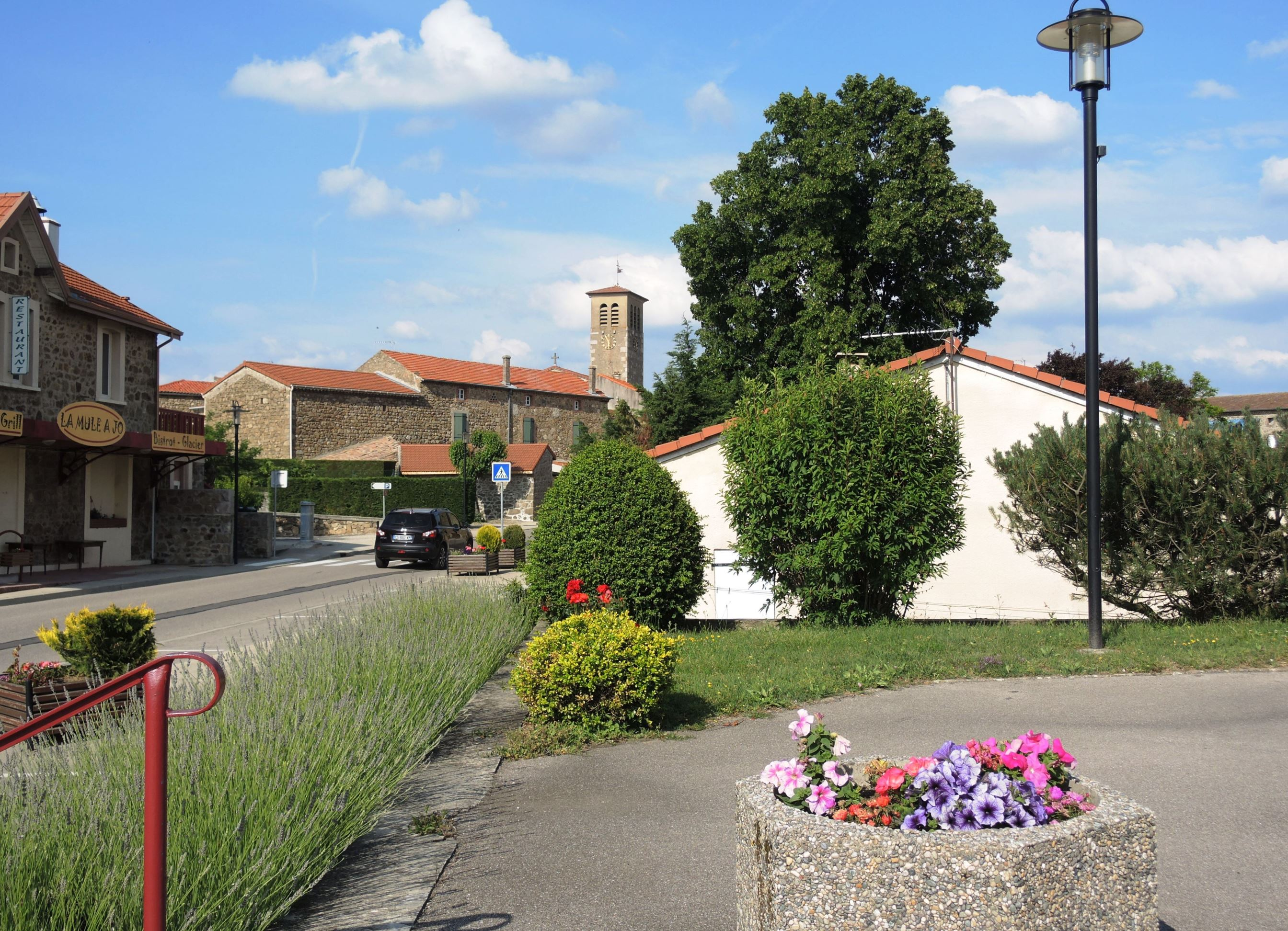 Ardoix village entrée